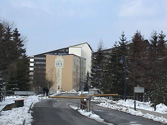 Skihotel in Schöneck/Vogtl. Skihotel in Schöneck/Vogtl. (28. März 2004). Aufnahme: Steffen Mokosch